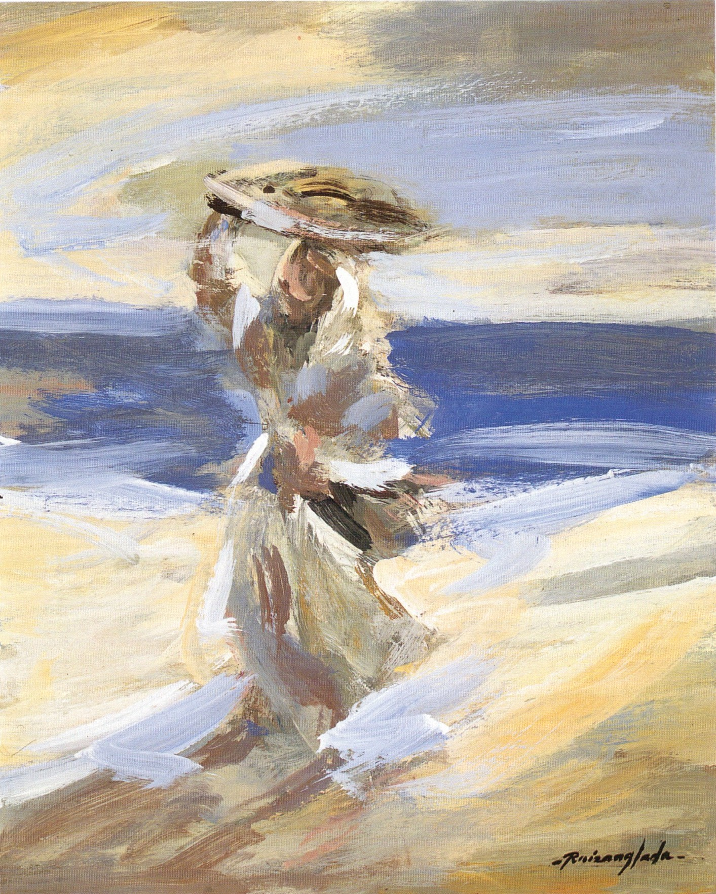 Ruizanglada Pescadora del Mediterraneo 33x41 1999 Oleo sobre tabla.